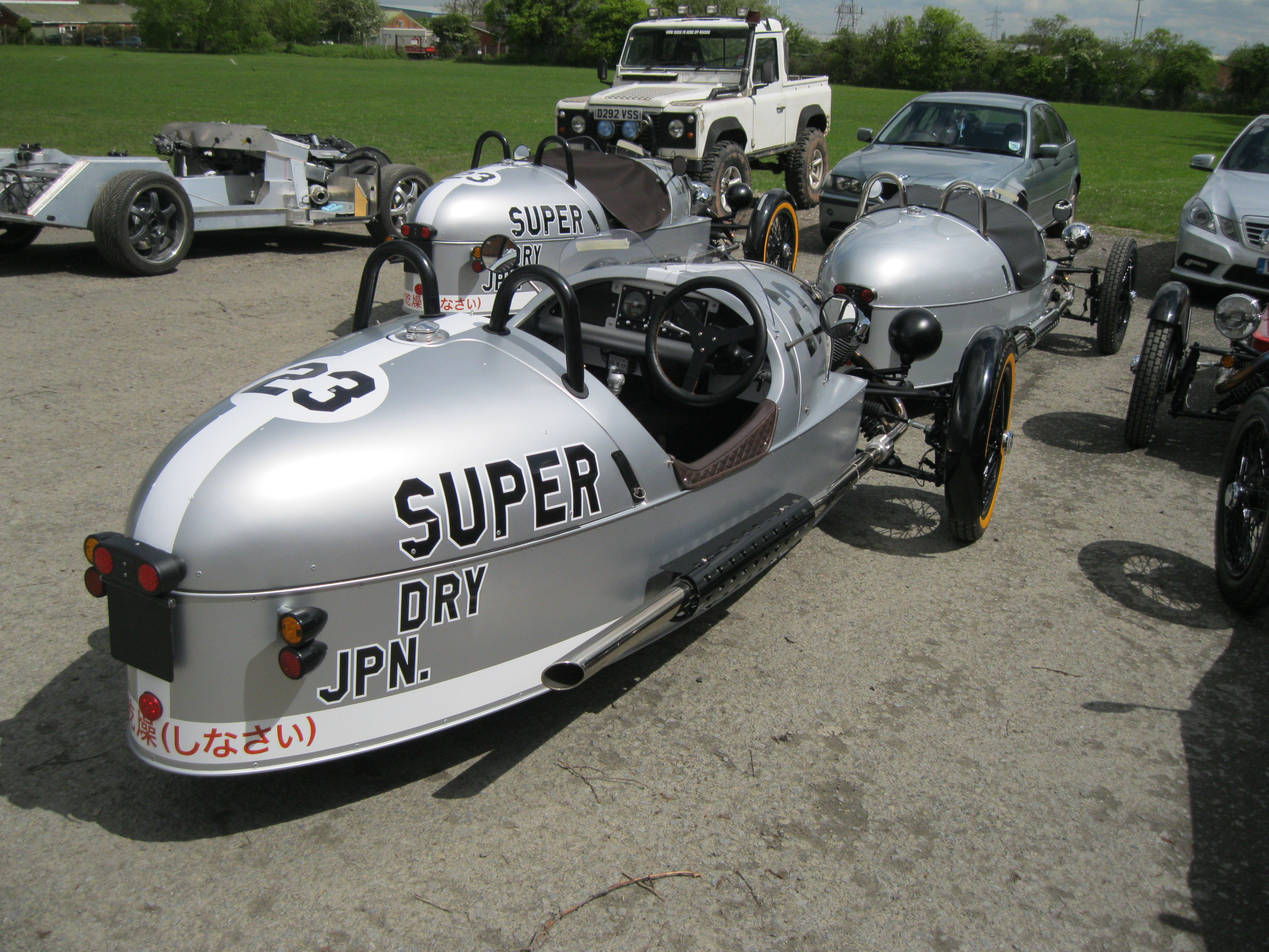 2012 Morgan 3 wheeler Super Dry